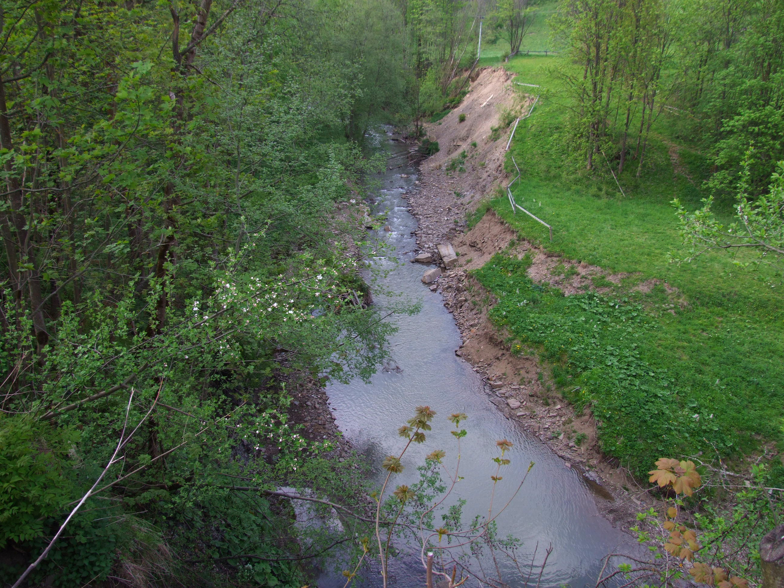 Osturniansky potok